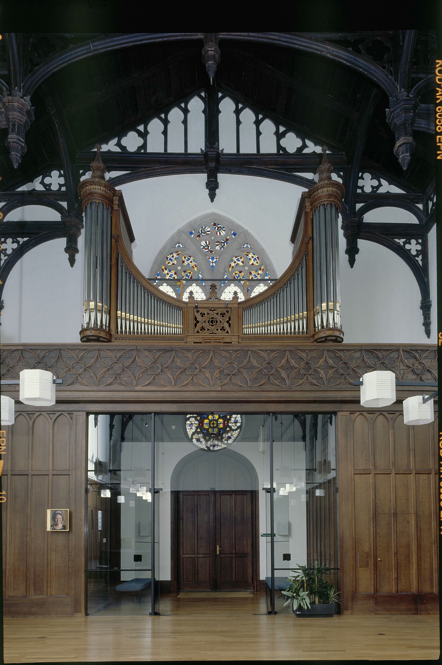 Gotische Zaal, thans Raad van State: Interieur, aanzicht orgel en ingangspartij (opmerking: Gefotografeerd voor Het Historische Orgel in Nederland 1840-1849)